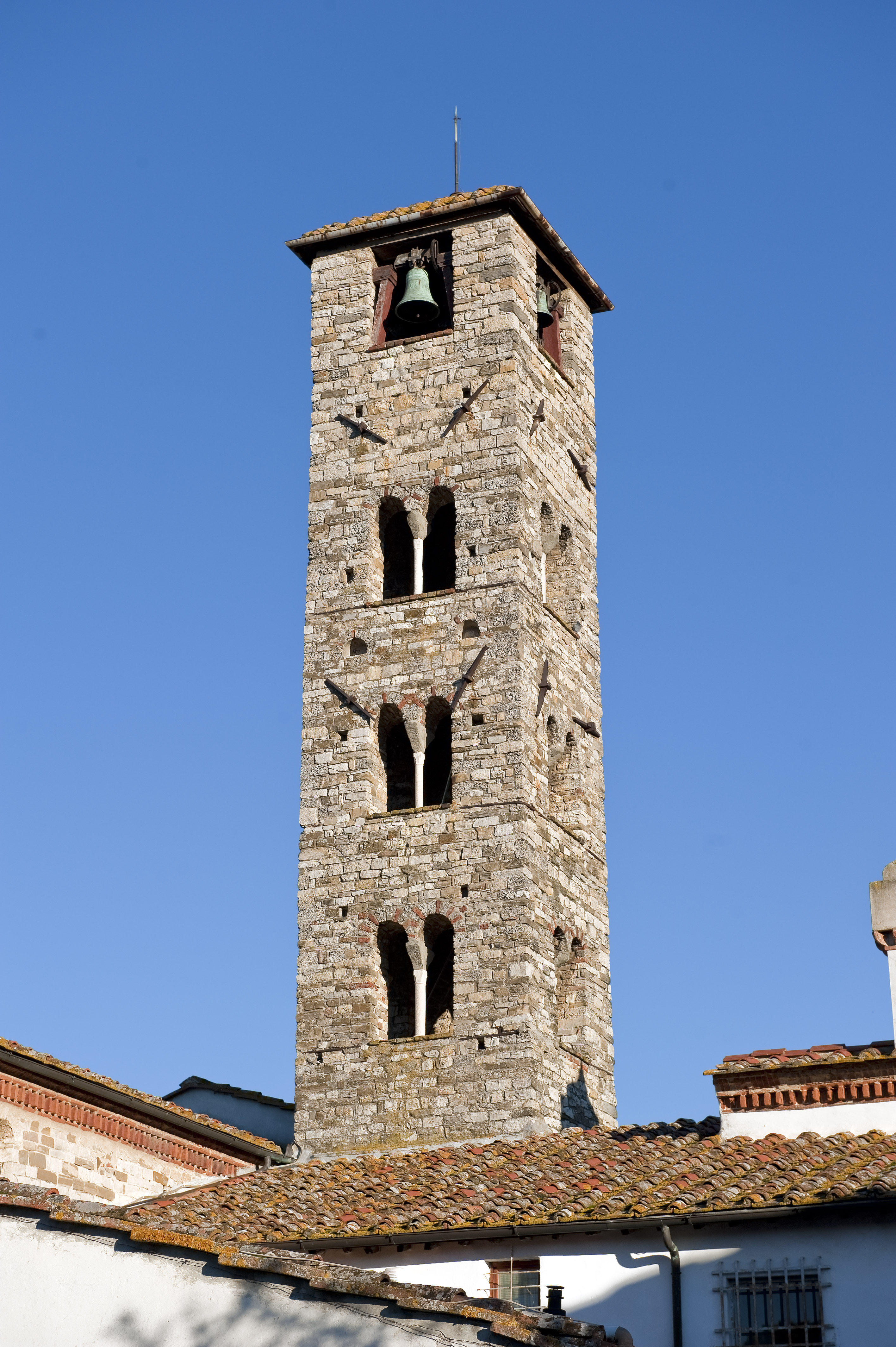 Campanile della pive di San Donnino a Villamagna - Bagno a Ripoli